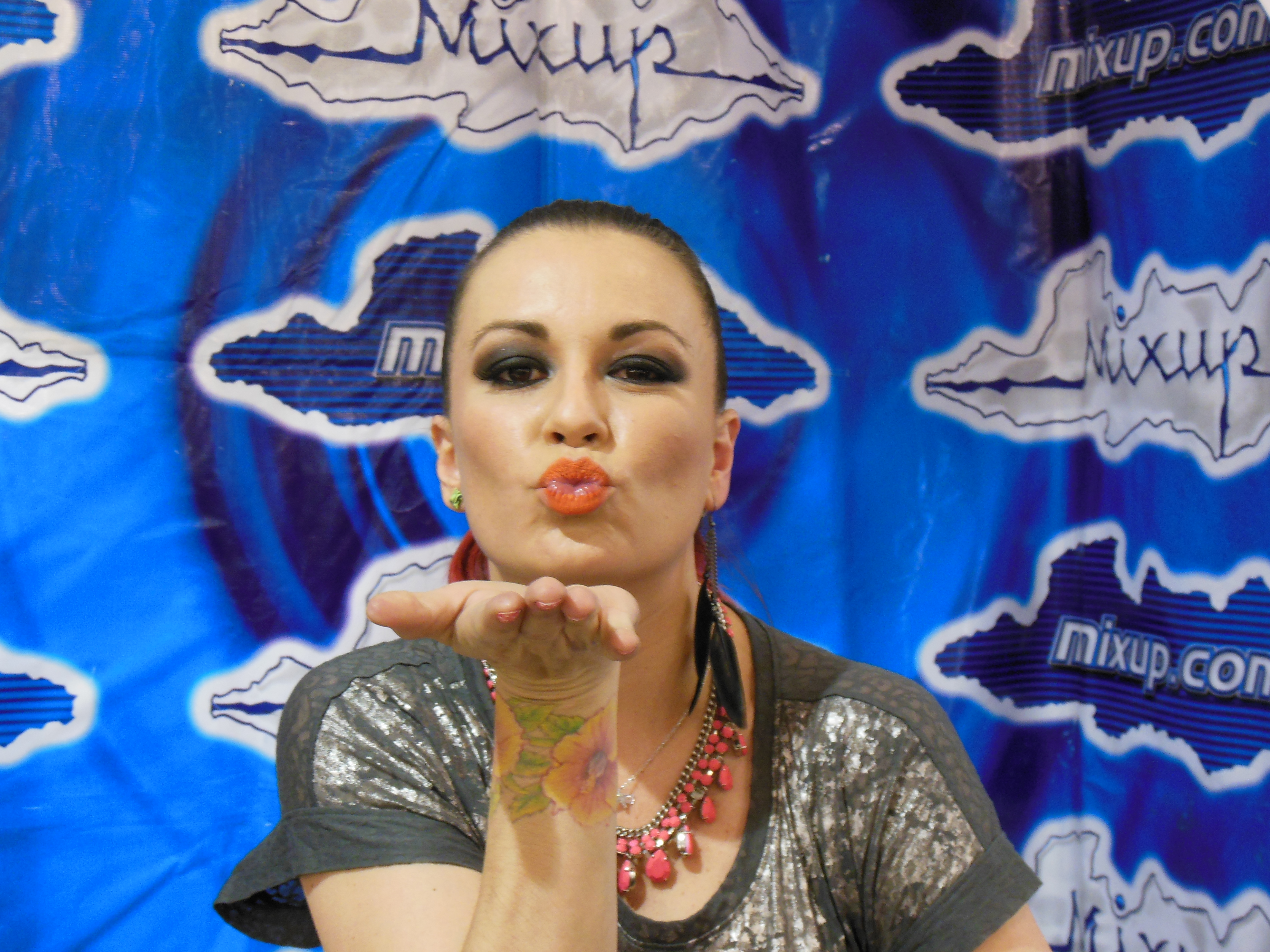 María “La Josa” José fue a MixUp (una tienda de discos) para firmar su nuevo disco “De Noche”. Con su permisó, saqué una foto de ella para Wikipedia con una camera Nikon S6300 en color rojo.